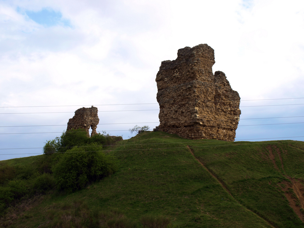 Saldanja, zamak u kojem je preminula Uraka I